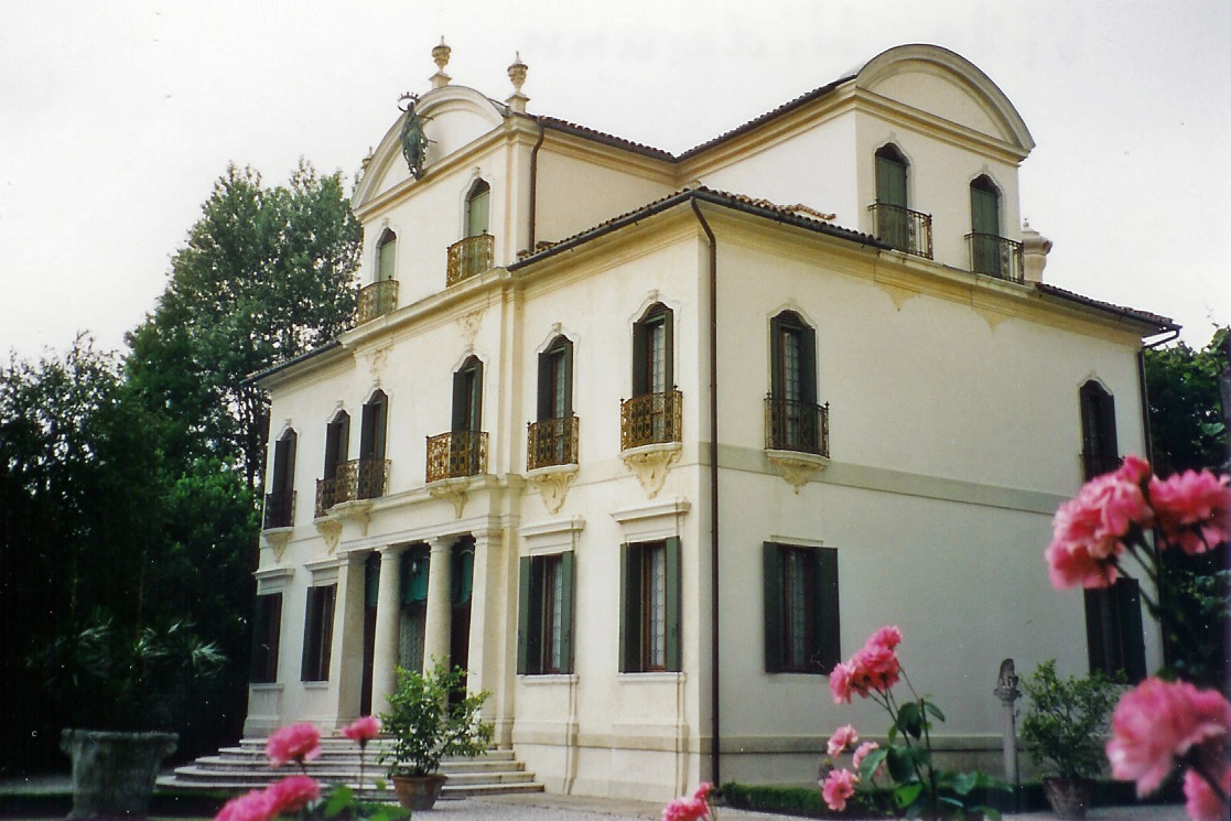 Villa Widmann Rezzonico Foscar, total view